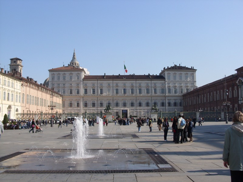 Torino - Palazzo Reale